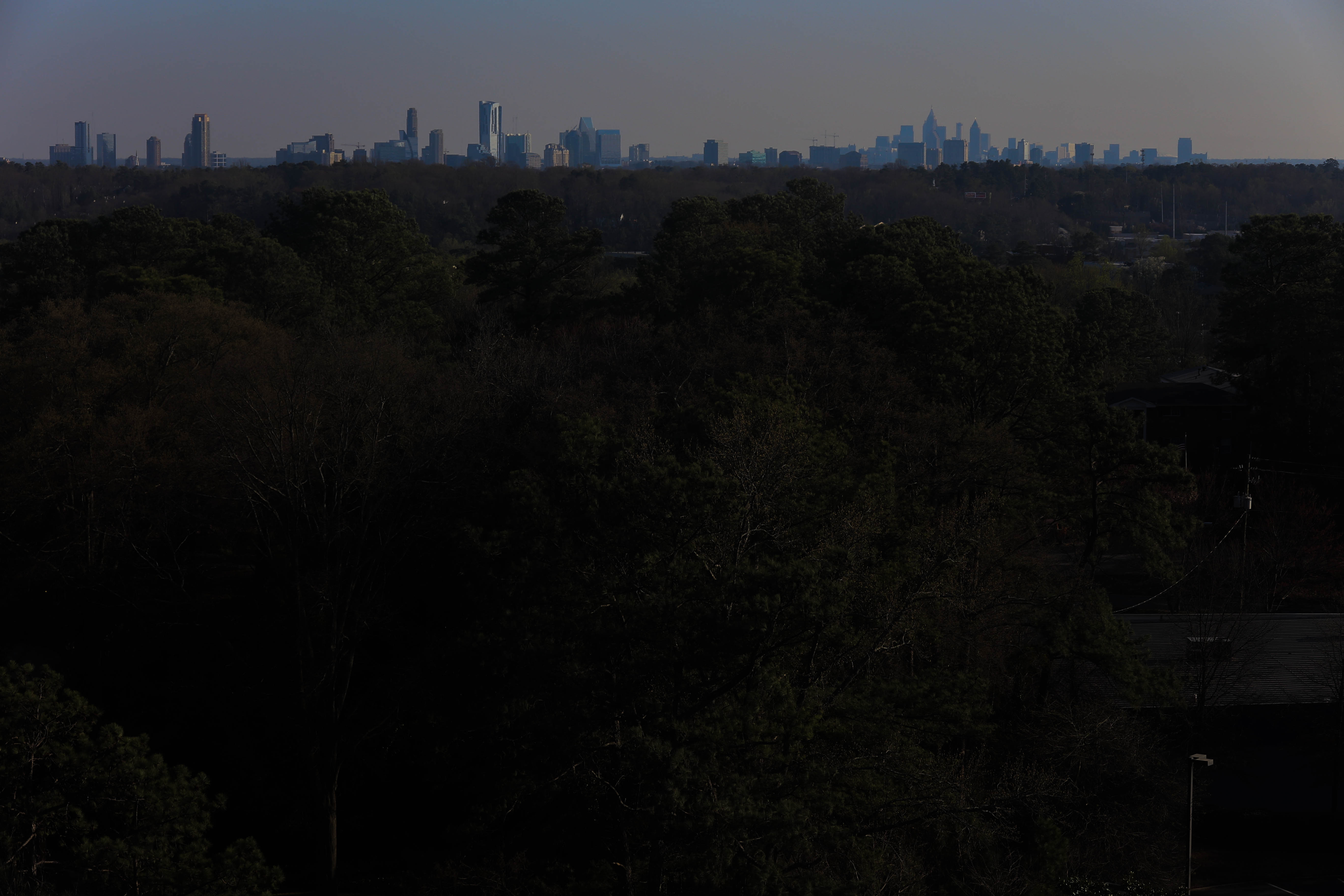 Atlanta skyline